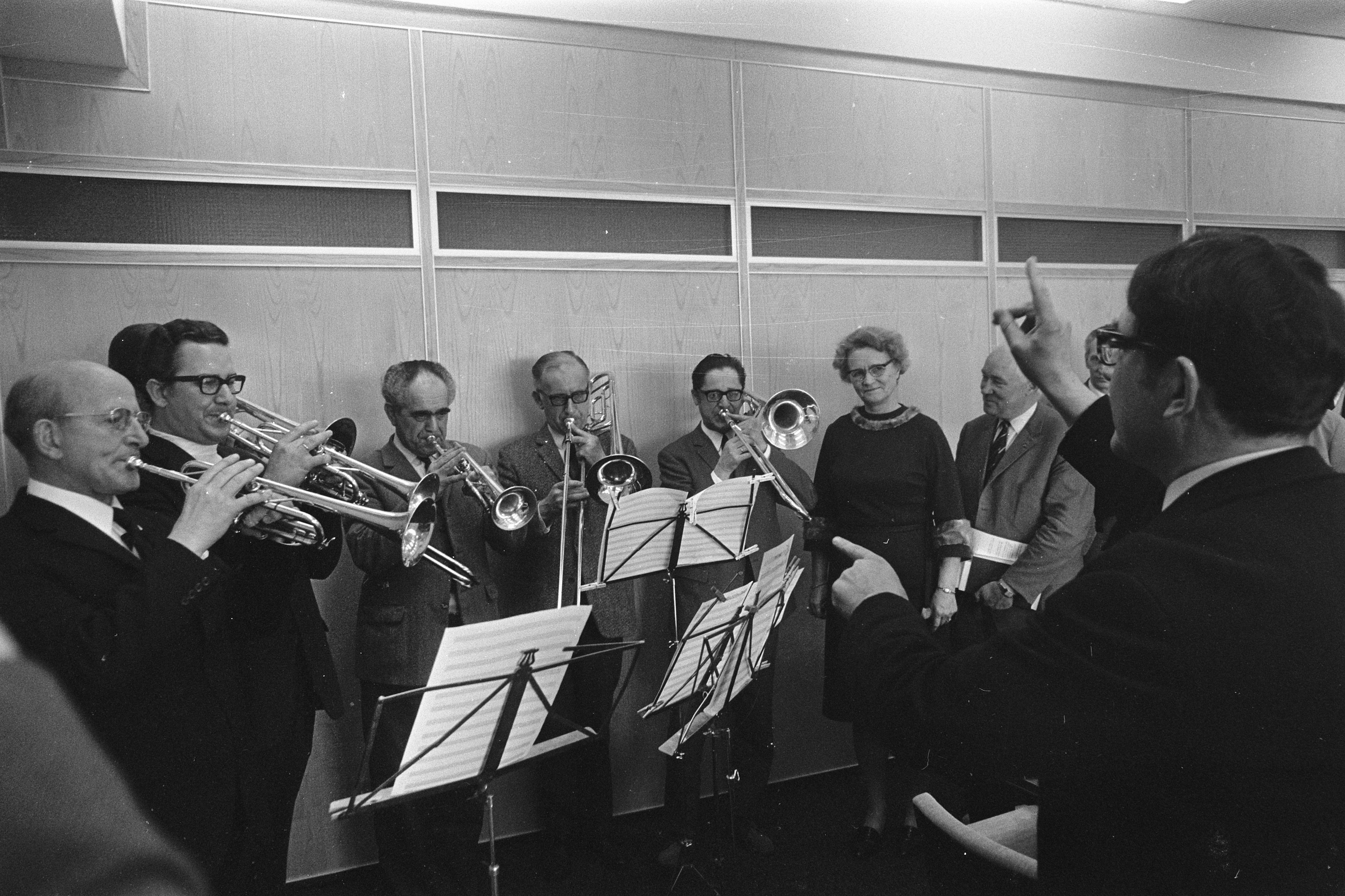 Collectie / Archief : Fotocollectie Anefo Reportage / Serie : Minister Marga Klompé minister van Cultuur, Recreatie en Maatschappelijk Werk ontvangt een delegatie van de Werkgroep honoraria Genootschap van Nederlandse Componisten Beschrijving : Robert Heppener (uiterst rechts) dirigeert het "orkest", derde van rechts minister Klompé Datum : 27 april 1970 Locatie : Den Haag, Zuid-Holland Trefwoorden : blazers, delegaties, ministers, ontvangsten Persoonsnaam : Klompé, (Marga) Dr. M.A.M., Heppener, Robert Fotograaf : Fotograaf Onbekend / Anefo Auteursrechthebbende : Nationaal Archief Materiaalsoort : Negatief (zwart/wit) Nummer archiefinventaris : bekijk toegang 2.24.01.05 Bestanddeelnummer : 923-4755